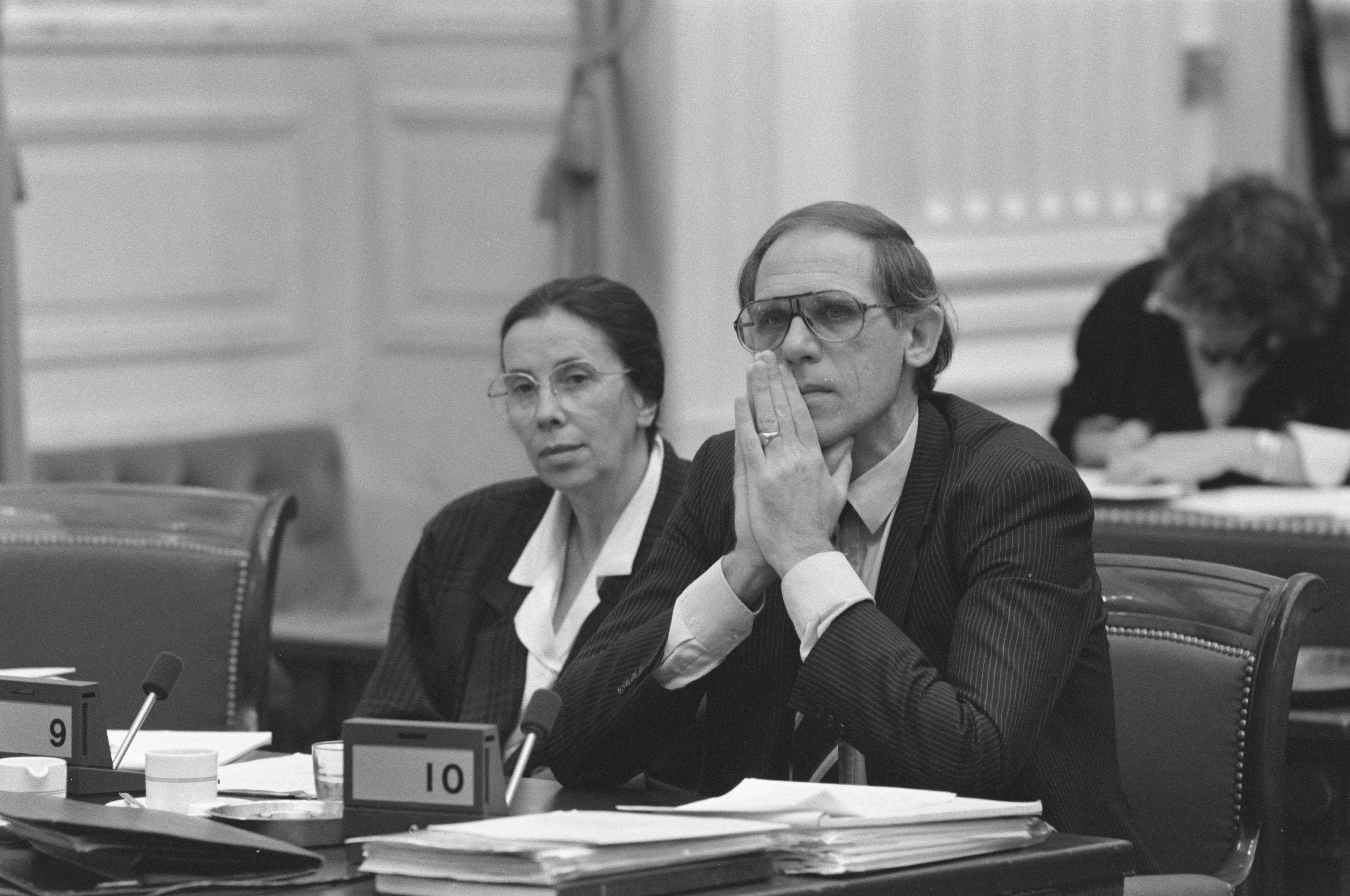 Collectie / Archief : Fotocollectie Anefo Reportage / Serie : [ onbekend ] Beschrijving : Kamercie. Justitie over adoptie anders dan door echtpaar Datum : 24 oktober 1988 Trefwoorden : kamerdebatten Persoonsnaam : Dijkstal, Doelman, Korte-van Hemel, Virginie Fotograaf : Croes, Rob C. / Anefo Auteursrechthebbende : Nationaal Archief Materiaalsoort : Negatief (zwart/wit) Nummer archiefinventaris : bekijk toegang 2.24.01.05 Bestanddeelnummer : 934-3451